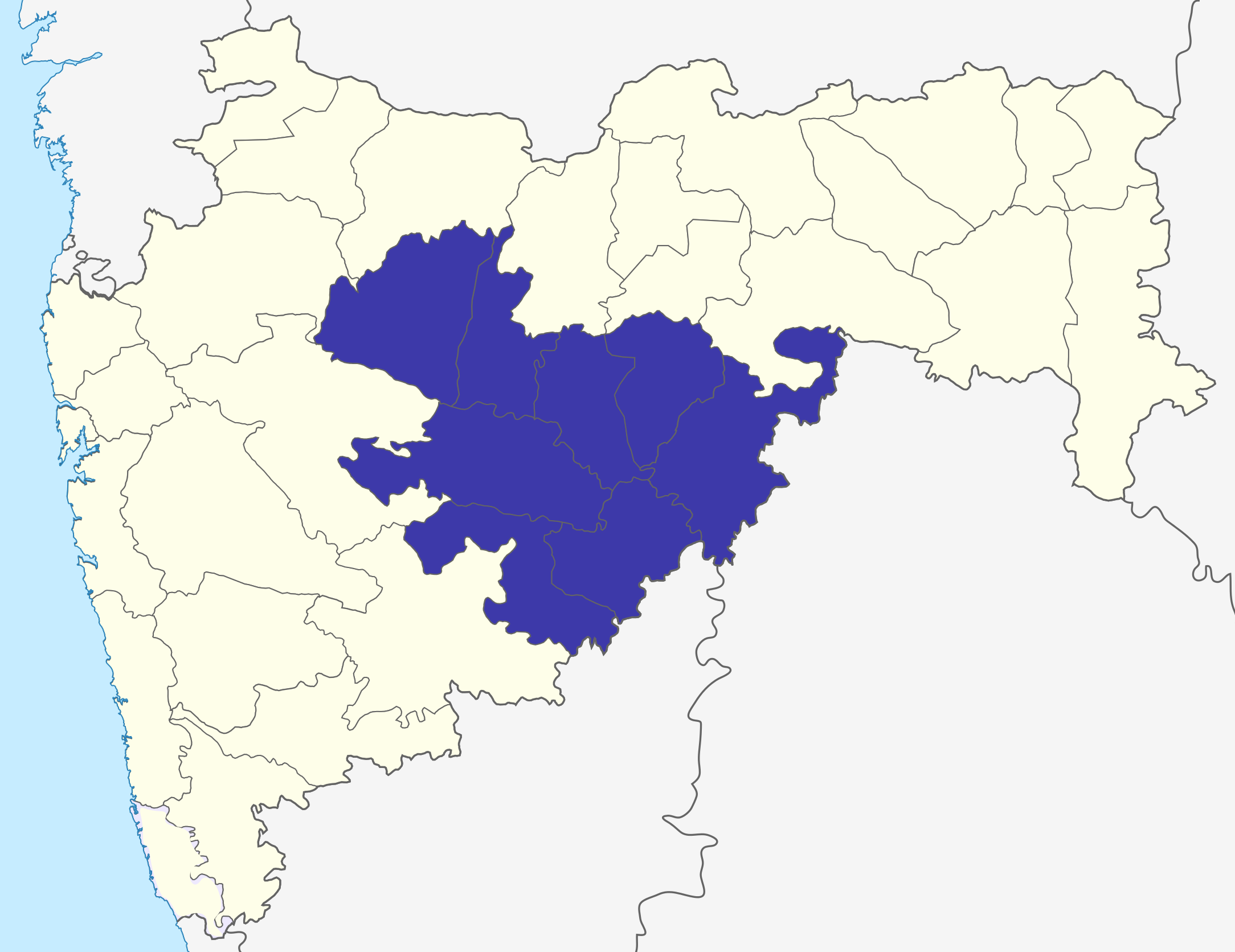 Aurangabad division in Maharashtra, India